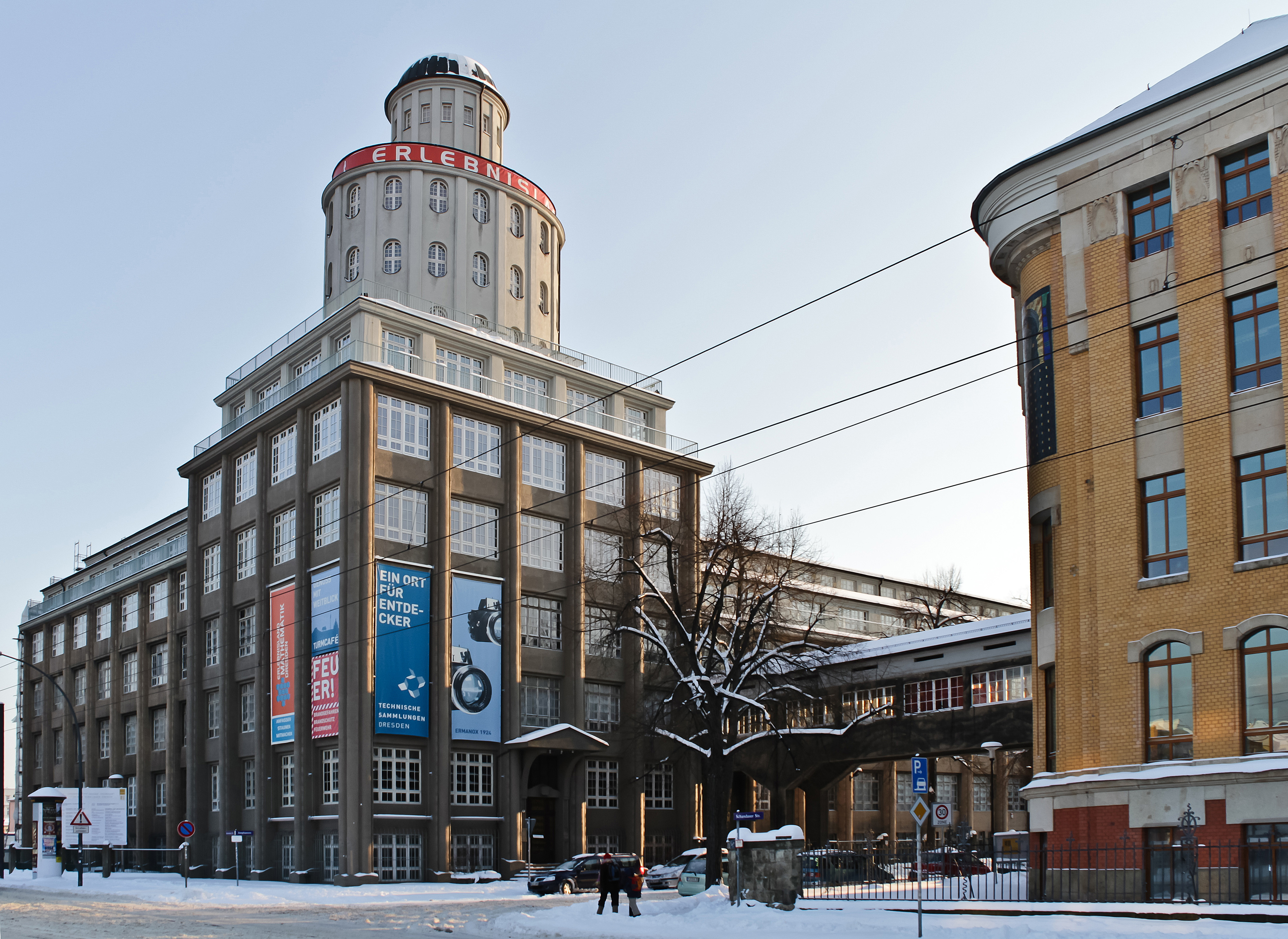 Ernemann-Werke Dresden 2010